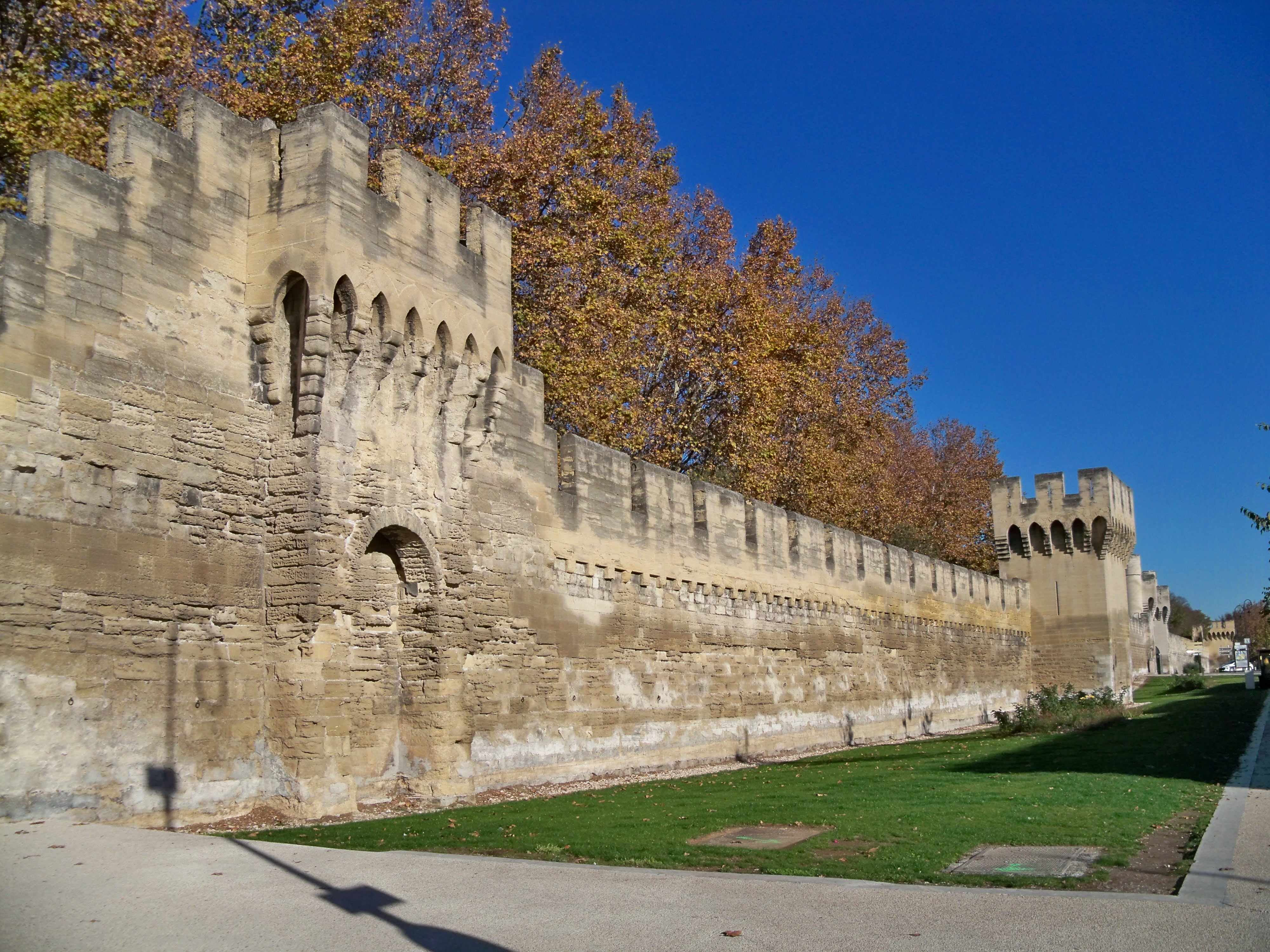 remparts à Avignon, Vaucluse, France